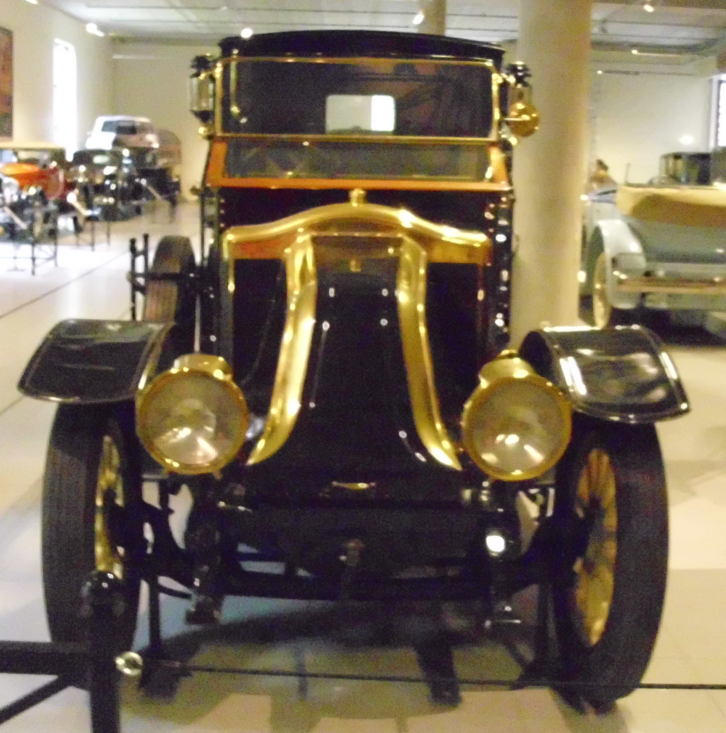 Renault Type DP Coupé-Chauffeur von Mühlbacher 1913